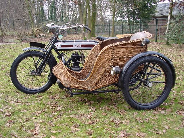 Toestemming van Yesterdays Antique Motorcycles (